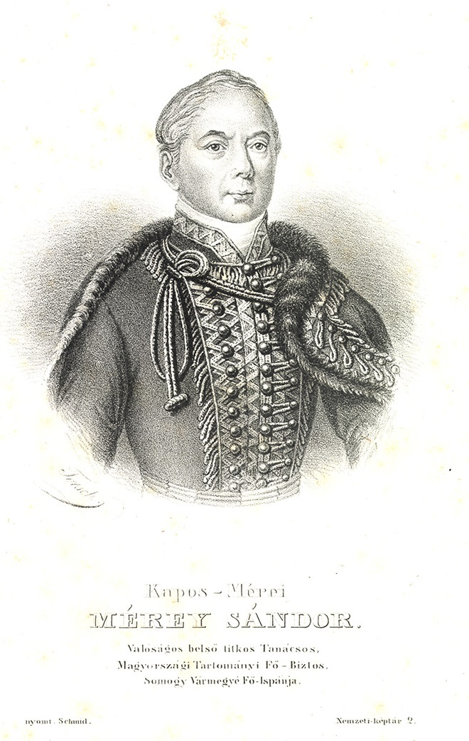 Mérey Sándor (Dunapentele, 1779. szeptember 18. – 1848. október 9.) író-drámafordító, főispán, királyi személynök, valóságos belső titkos tanácsos, aranysarkantyús vitéz és kamarás.